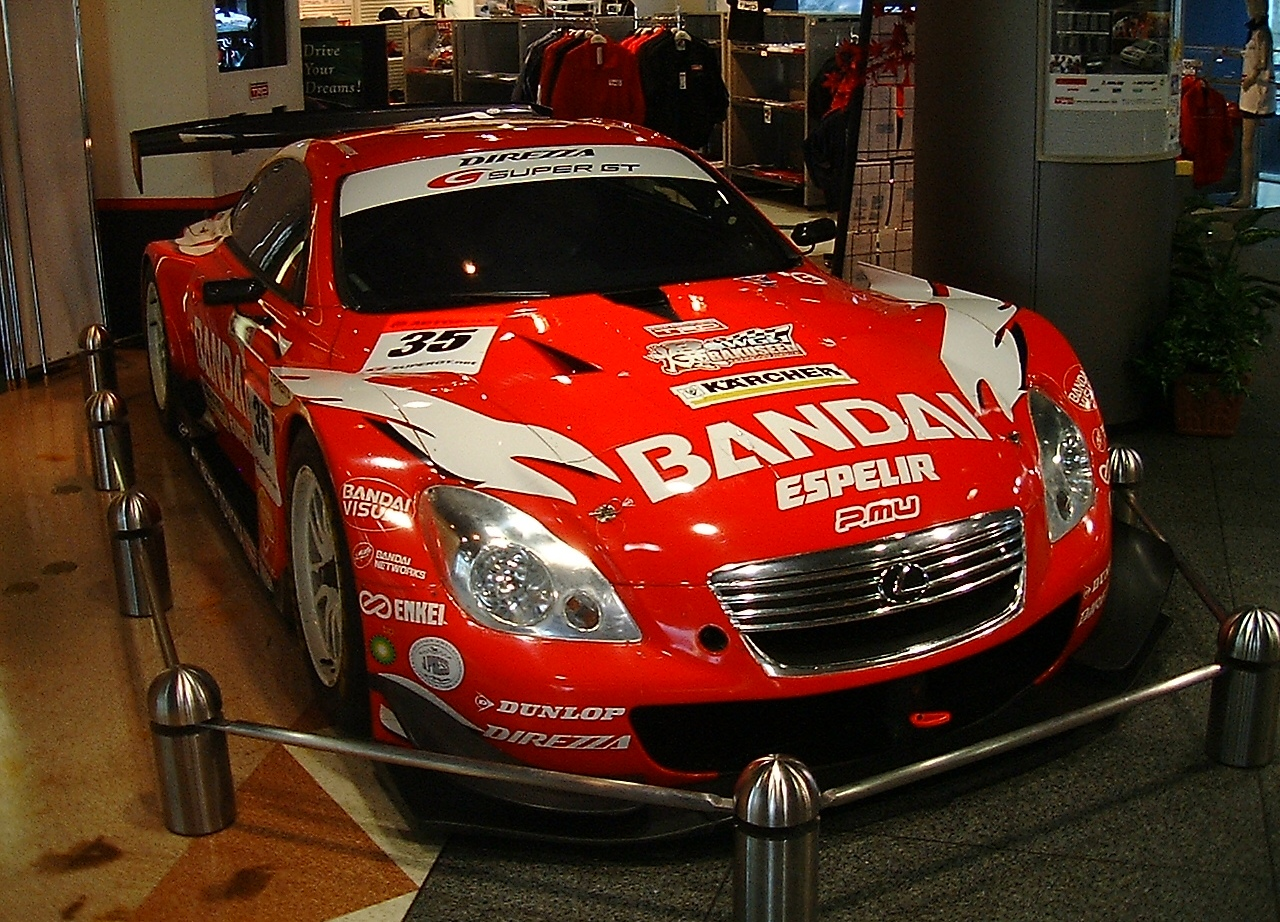 Lexus SC.